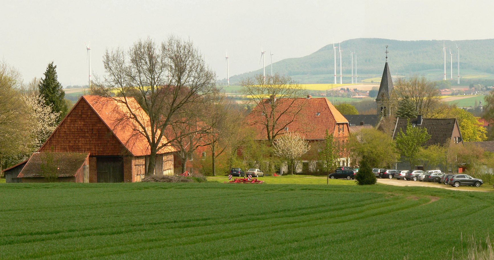 Gut Flegessen